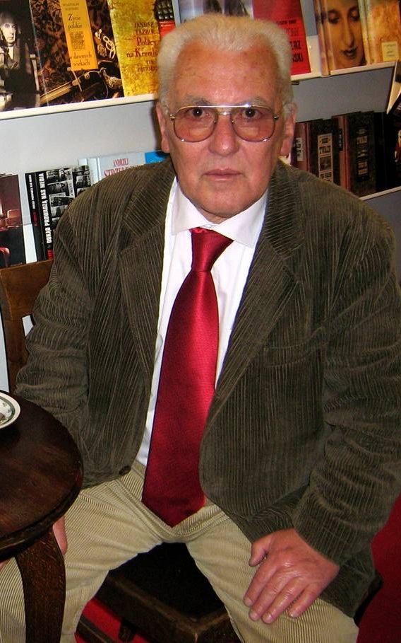 Krzysztof Teodor Toeplitz (ur. 28 stycznia 1933 w Otrębusach pod Pruszkowem) - polski dziennikarz